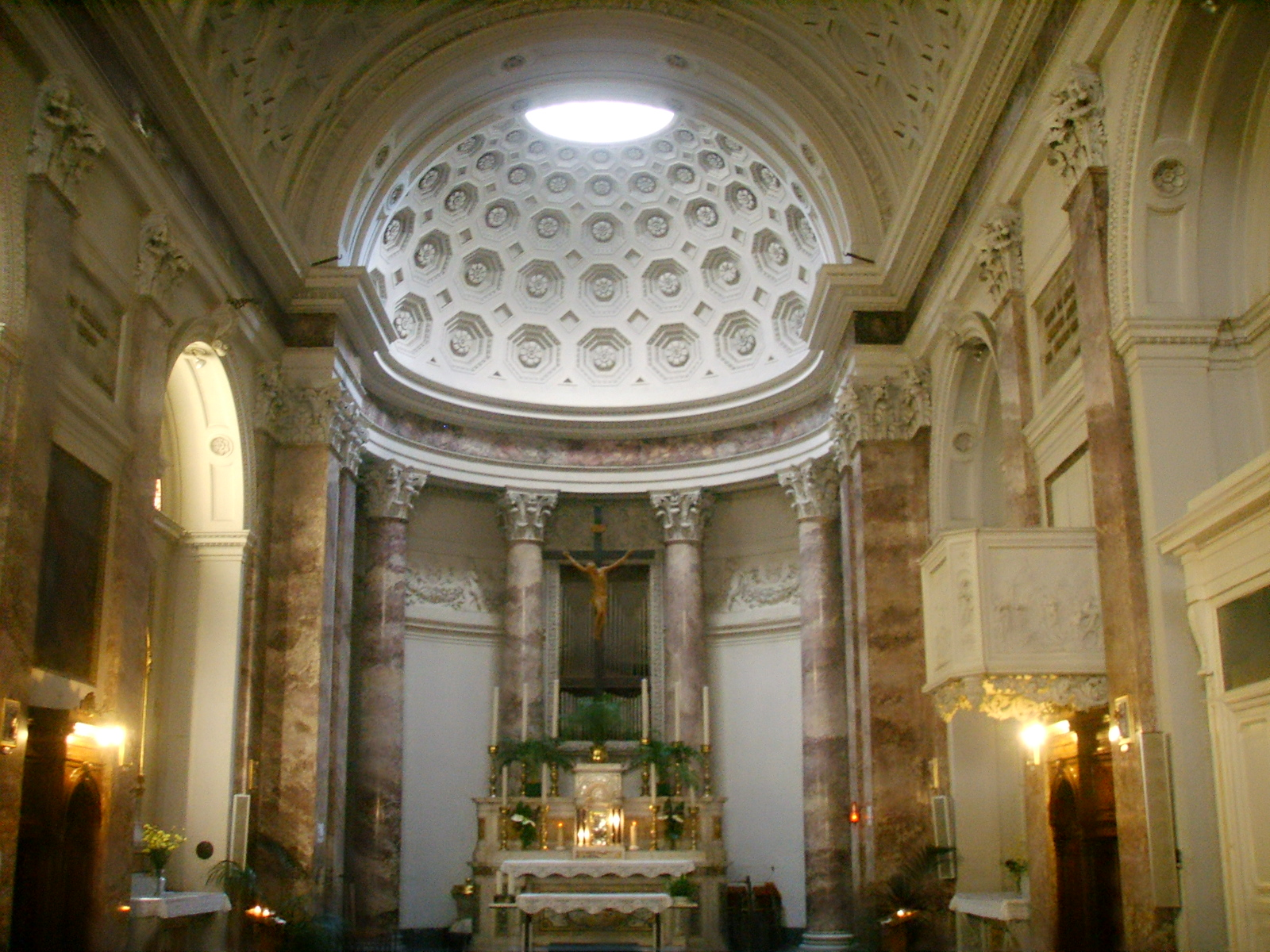 San_pierino (Chiesa di San Pier Forelli)